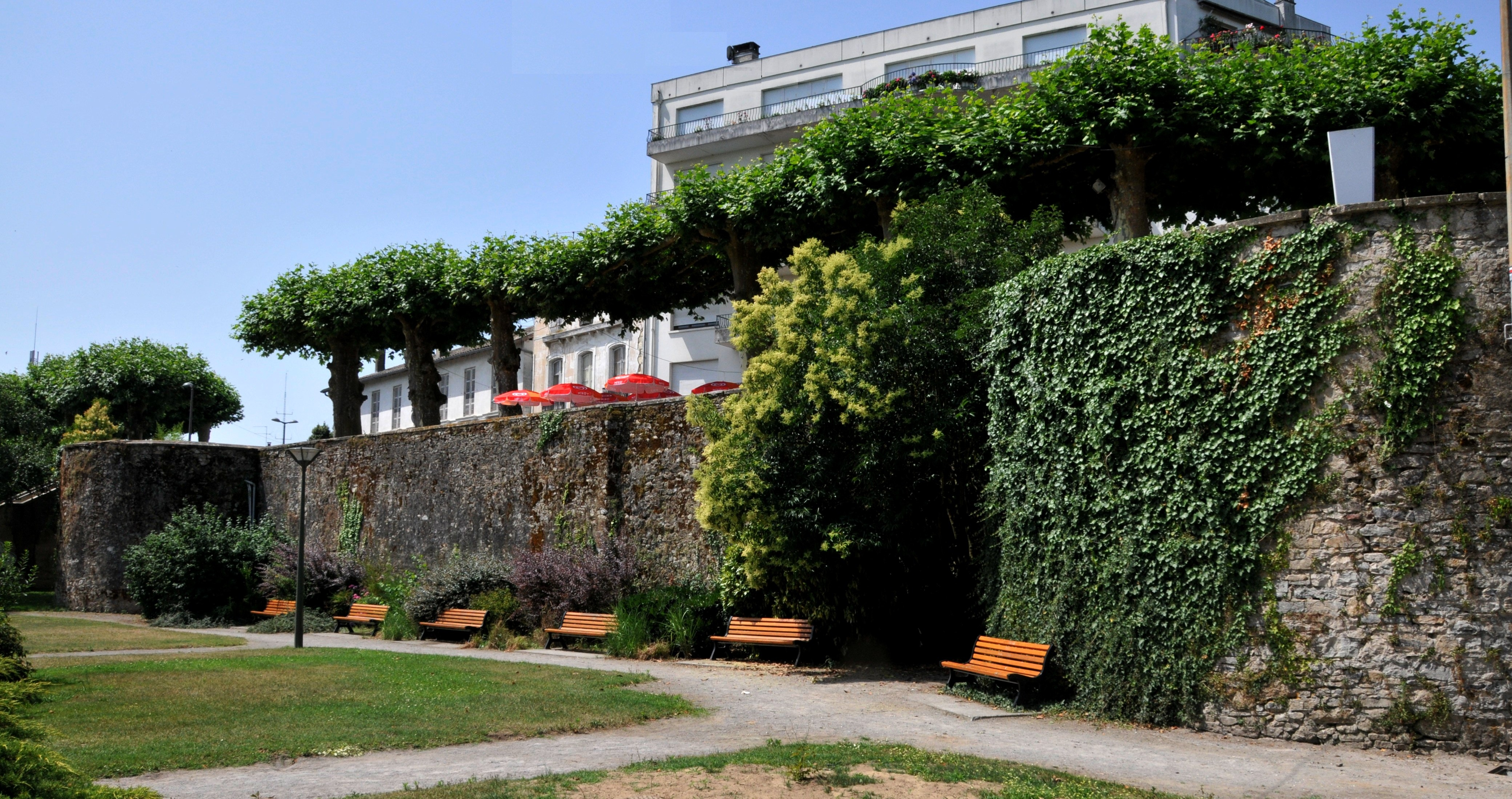 Dax, röm. Stadtmauer